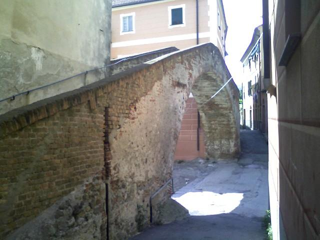 Antonello Piccone, centro storico Albisola Superiore (Italy)